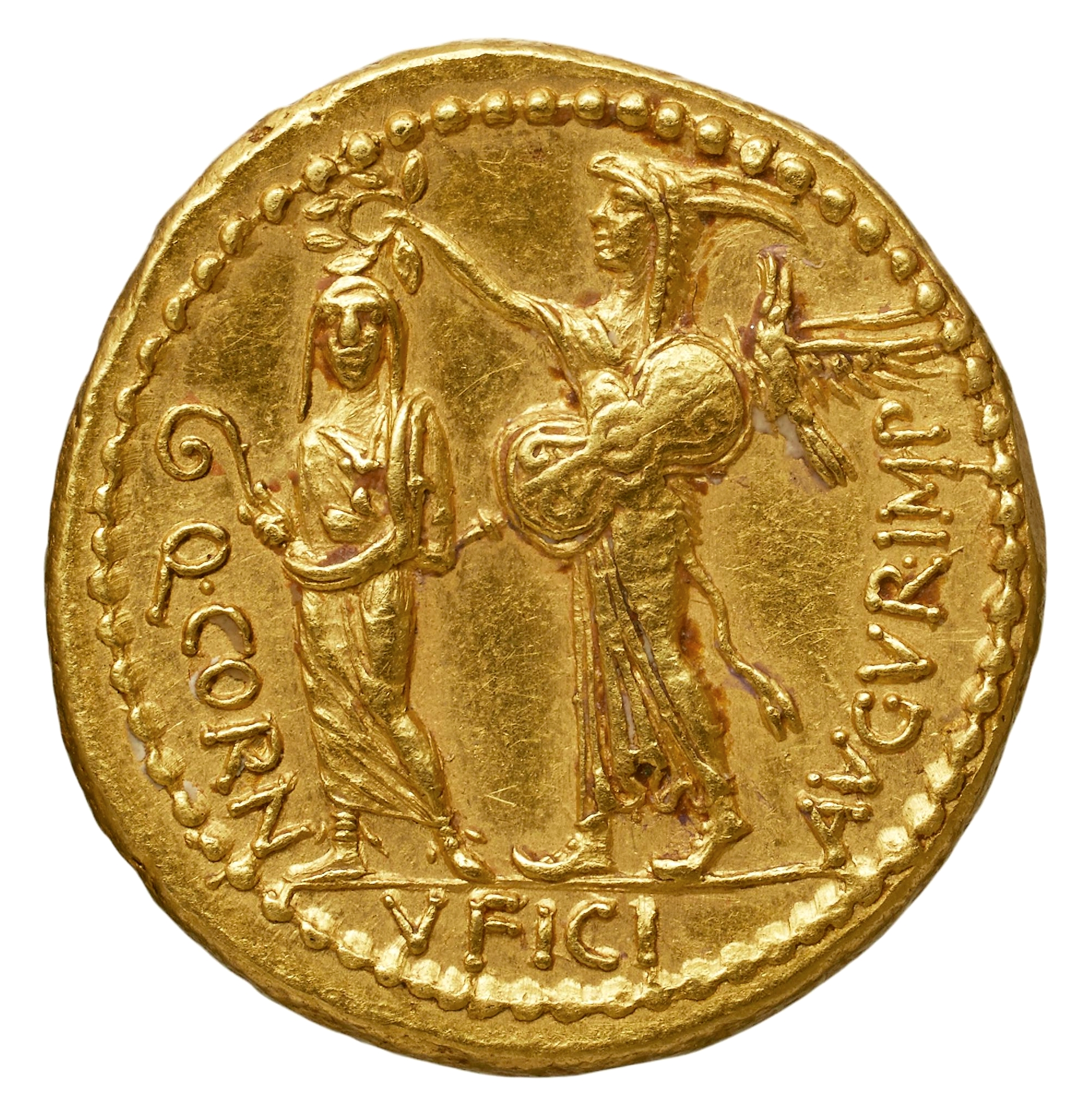 Aureus de Quintus Cornificius, vers 45 av.J.C. Or, 7,89 gr. Revers : Cornificius debout en robe d'augure couronné par Juno Suspita : Q·CORNVFI-CI AVGVR·IMP - BnF : REP-21378